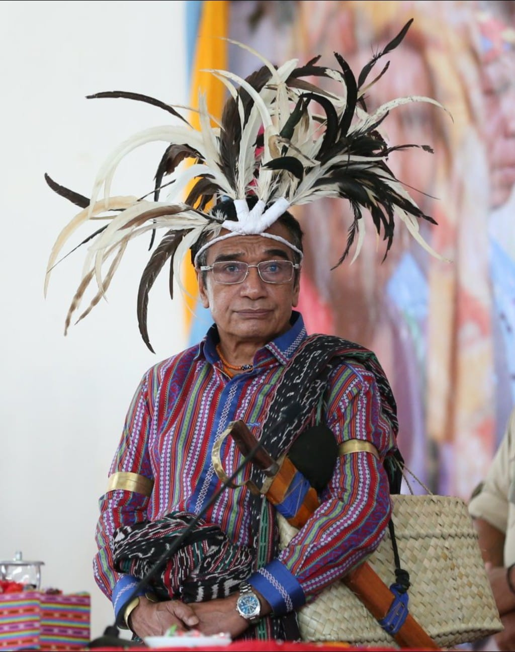 Präsident Francisco Guterres